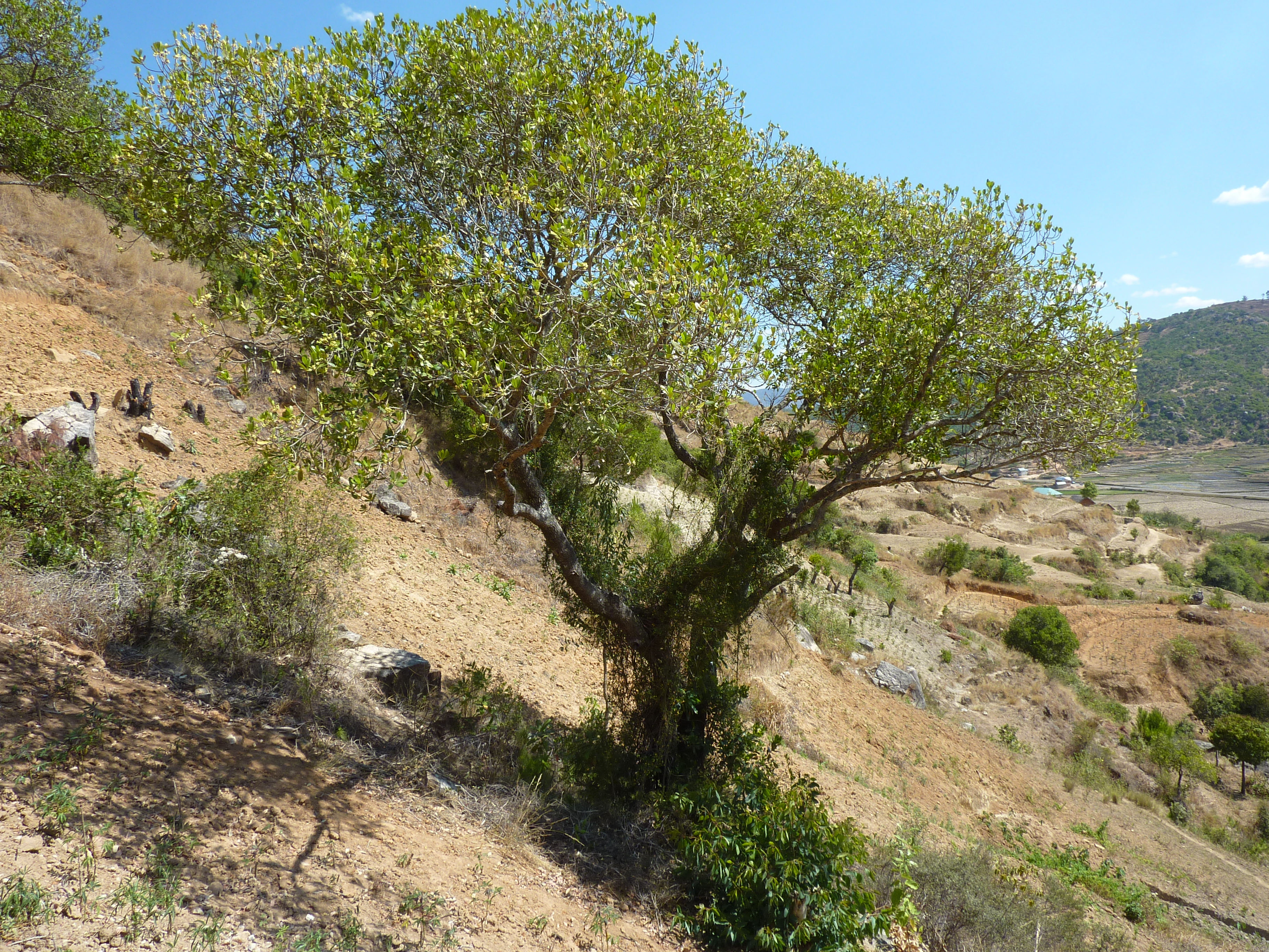 Tapia (Uapaca bojeri), arbre endémique des hauts-plateaux de Madagascar.